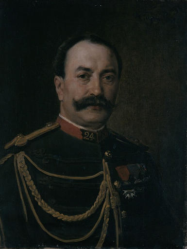 Le général Paul-Vincent Faure-Biguet en 1883